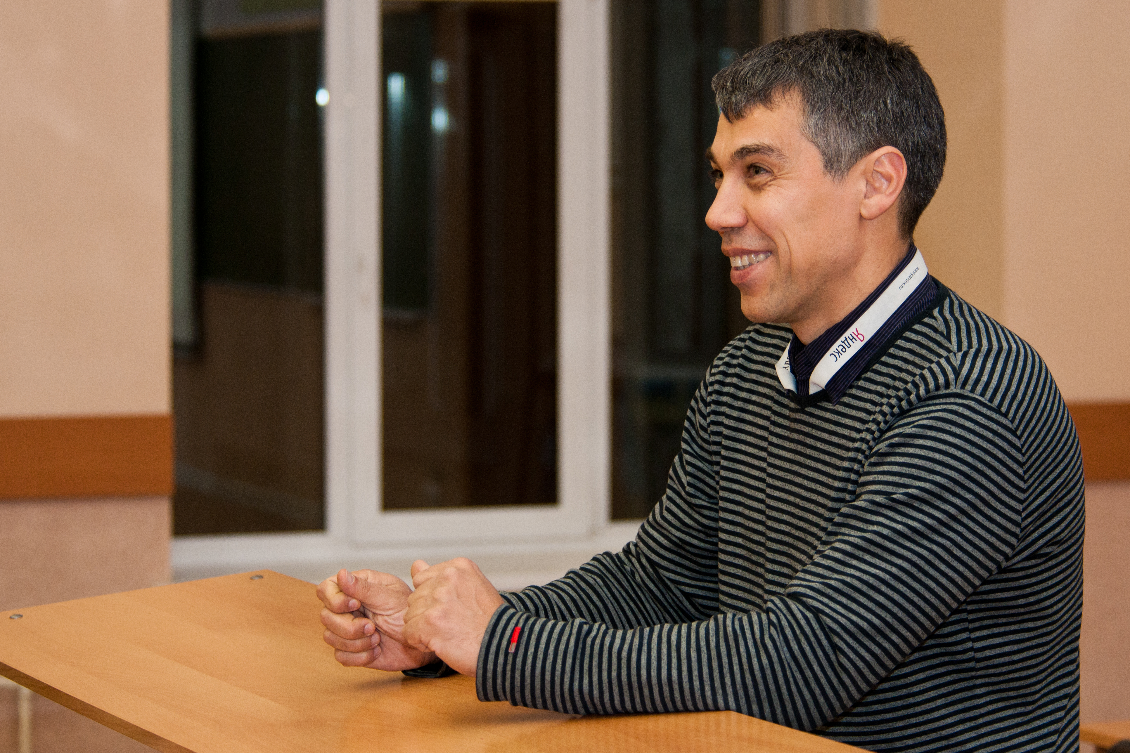 Илья Валентинович Сегалович — российский программист и общественный деятель, один из основателей (вместе со своим другом и одноклассником Аркадием Воложем) компании «Яндекс».